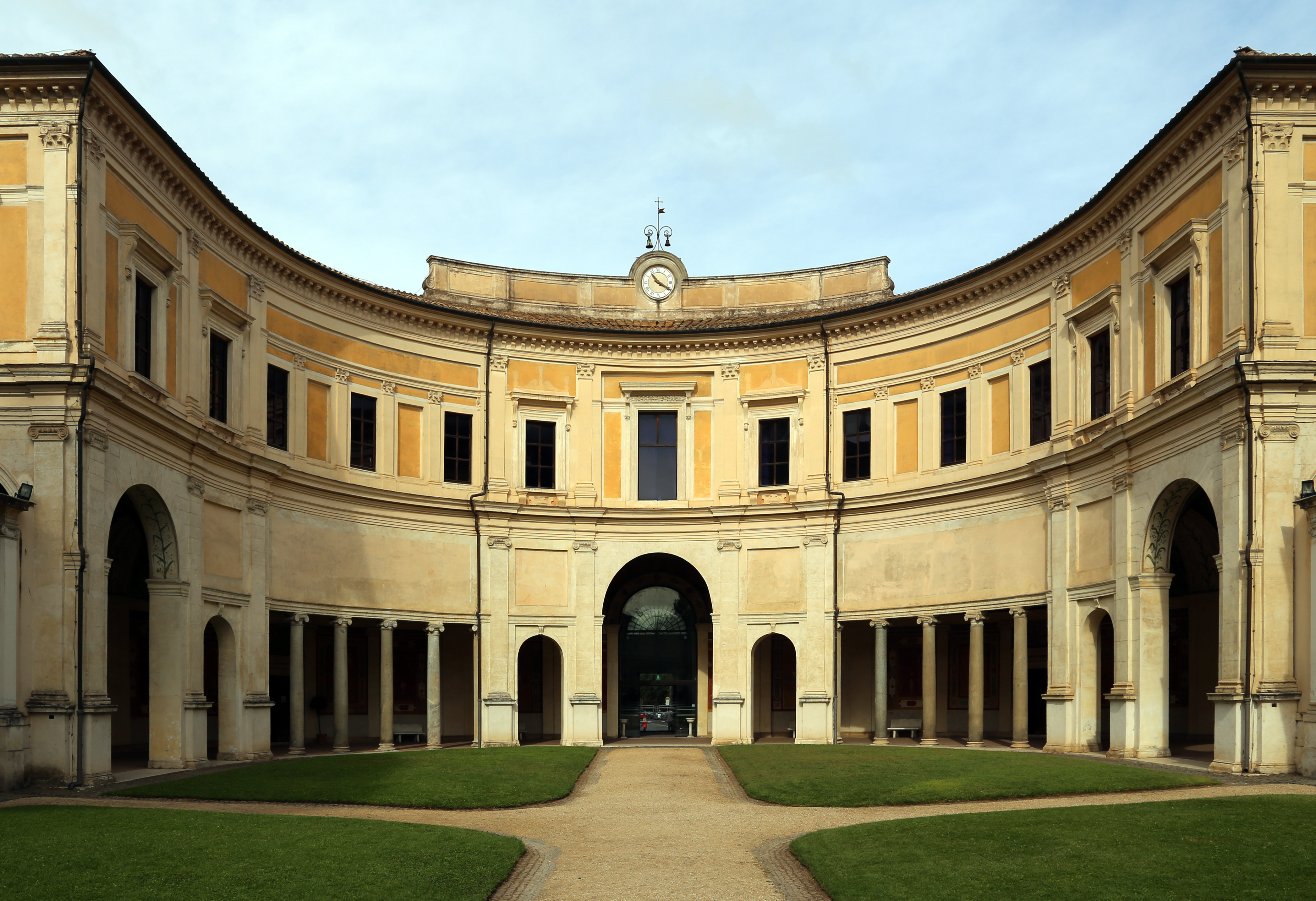 Villa Giulia (Rome) This is a photo of a monument which is part of cultural heritage of Italy.